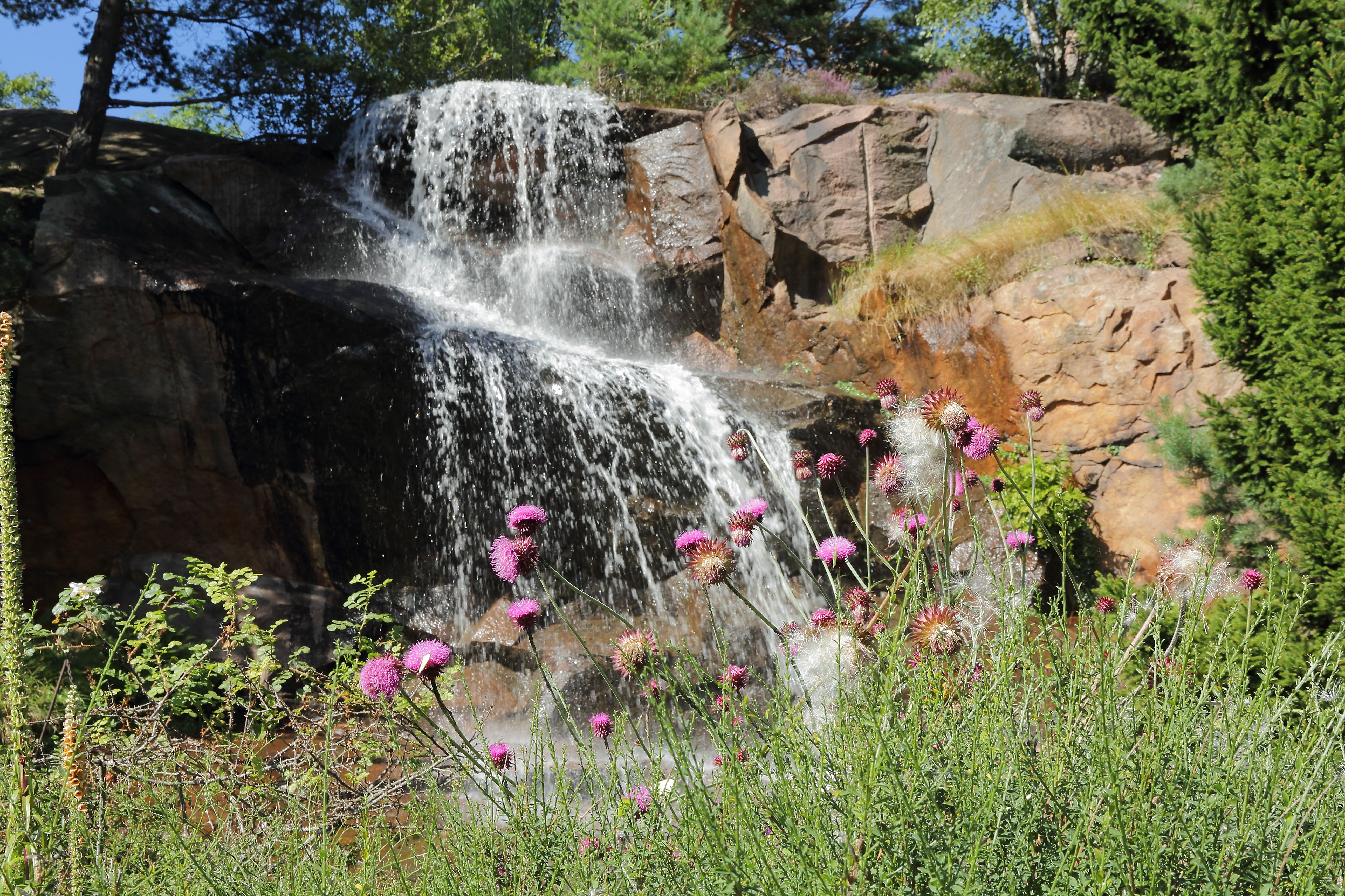 Göteborgs Botaniska Trädgård.